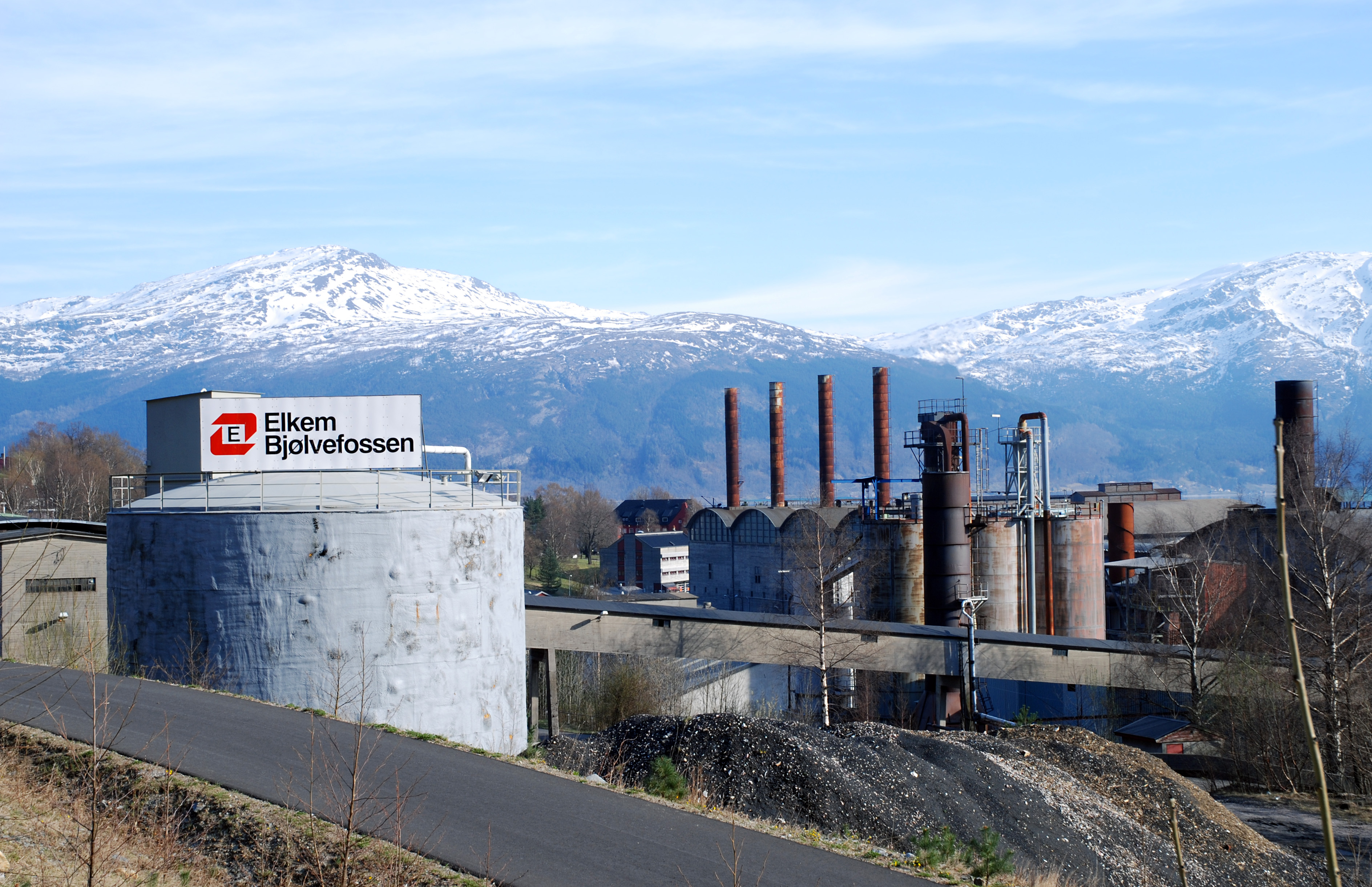 Elkem Bjølvefossen, in Ålvik, Hordaland, Norway.